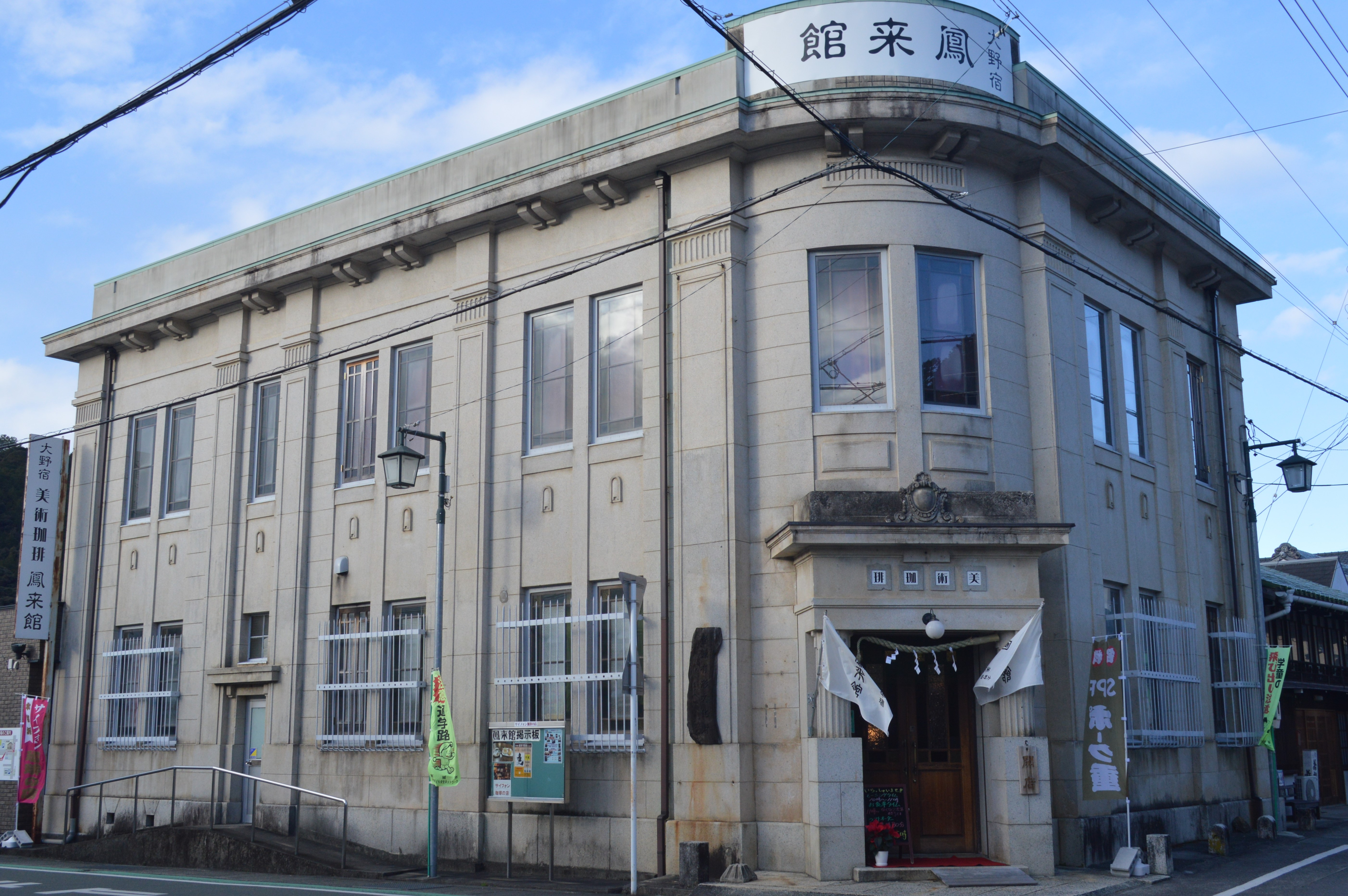 愛知県新城市大野にある「旧大野銀行（大野宿鳳来館）本館」。登録有形文化財。